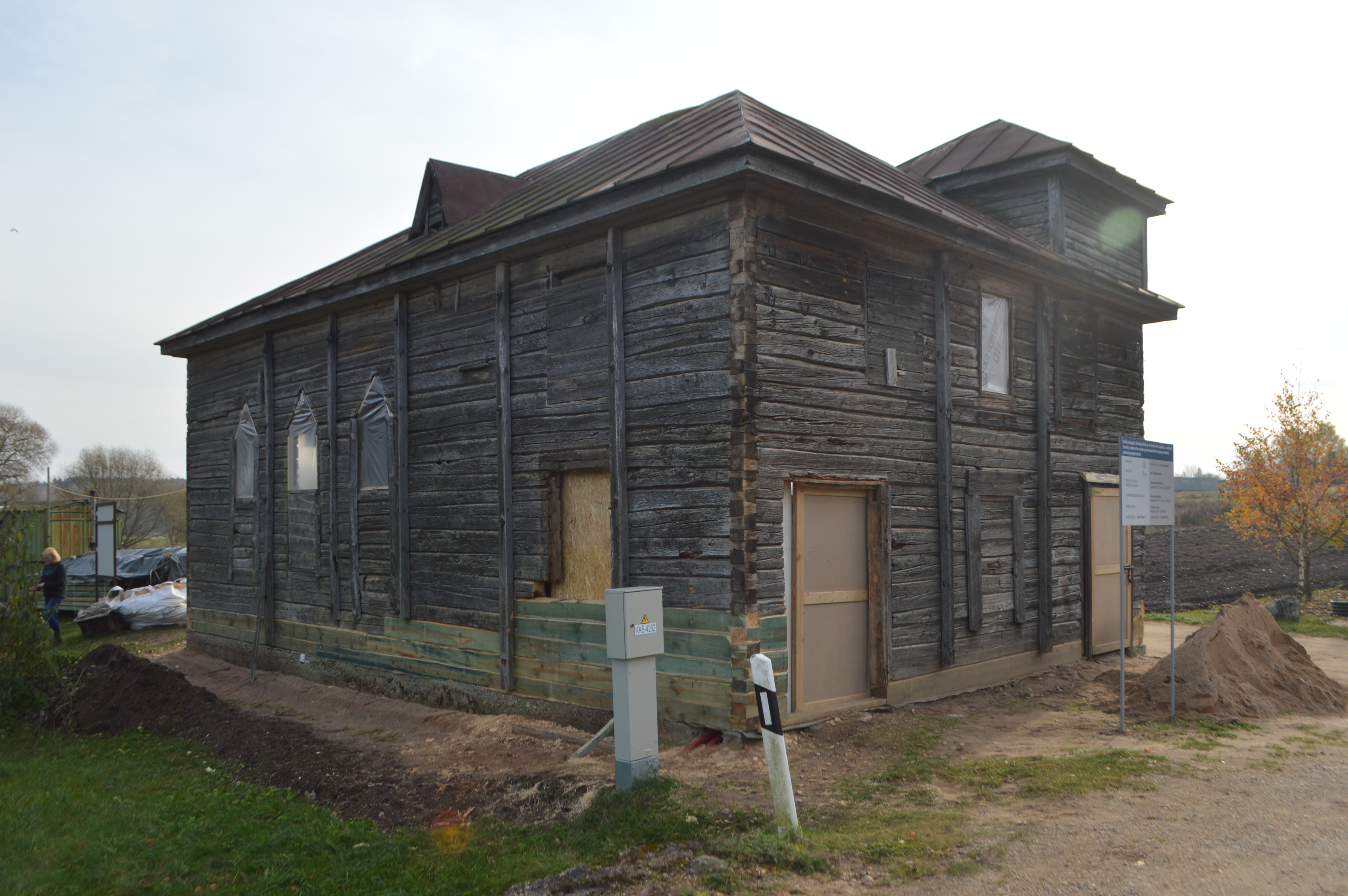 Beginn der Restaurierungsarbeiten an der Synagoge in Kurkliai